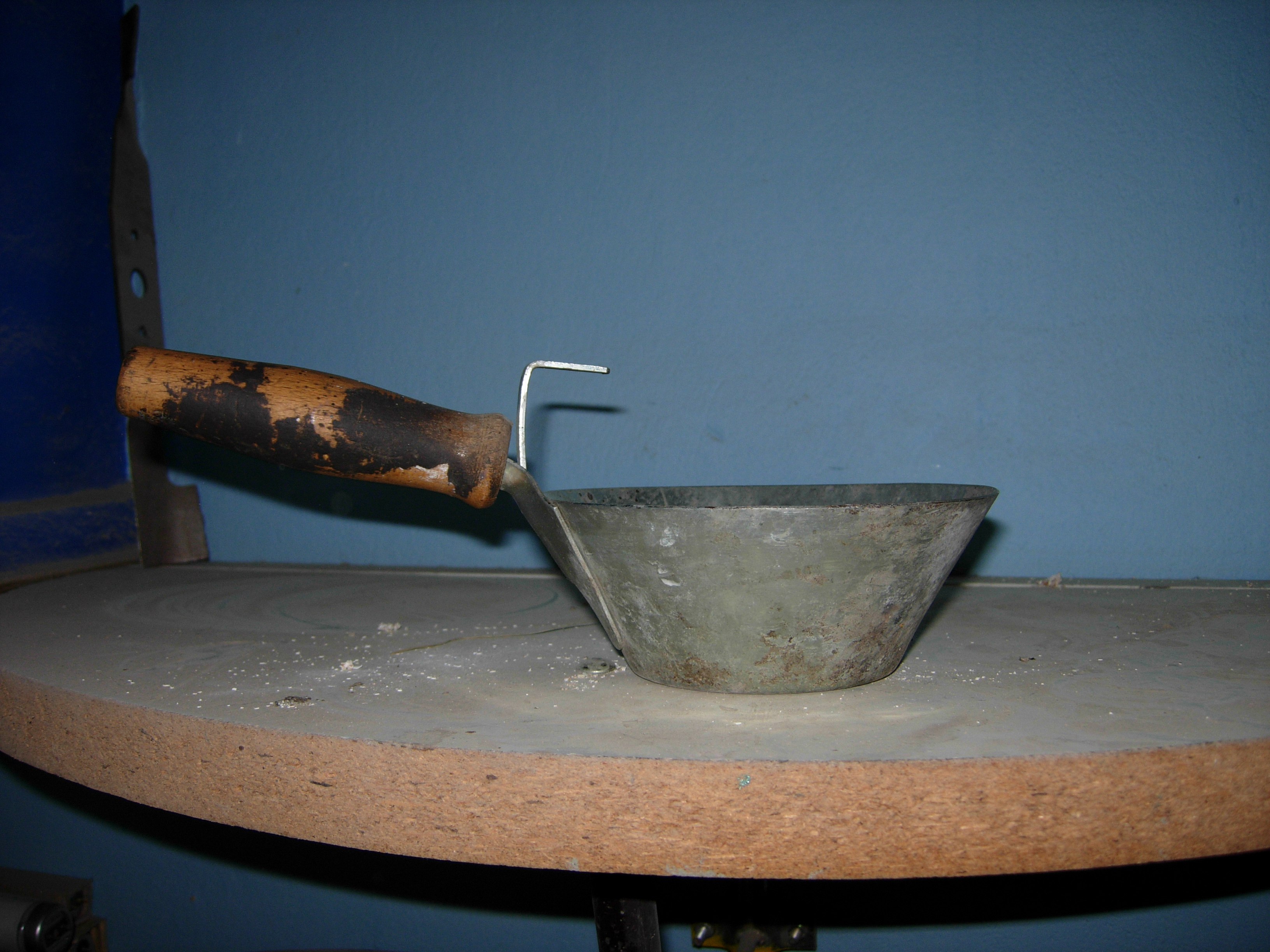 Fanka - pohled zboku.